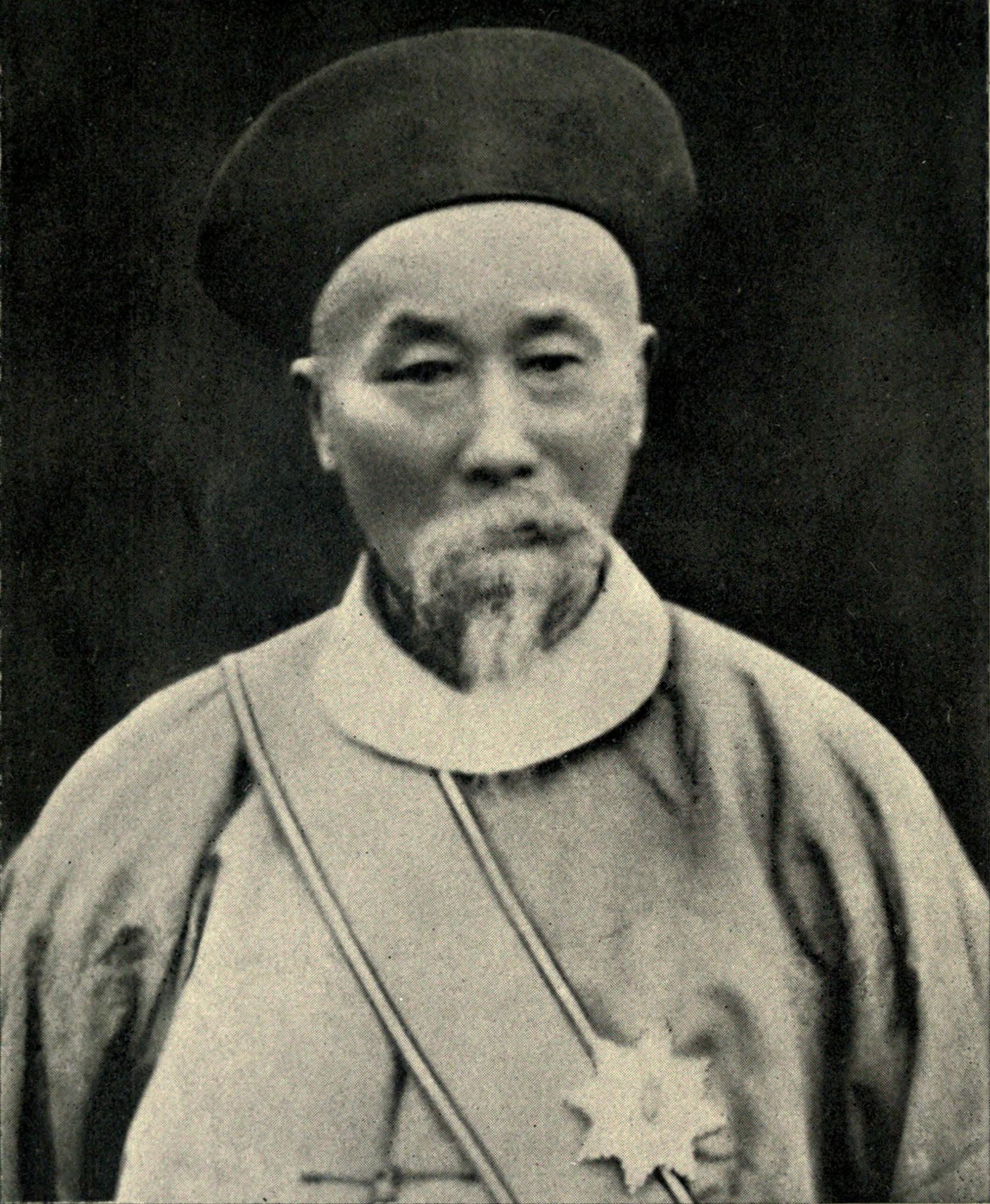 Li Hung-Chang